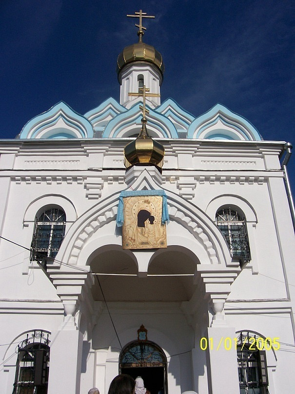 Свято-Андреевская церковь город Туймазы